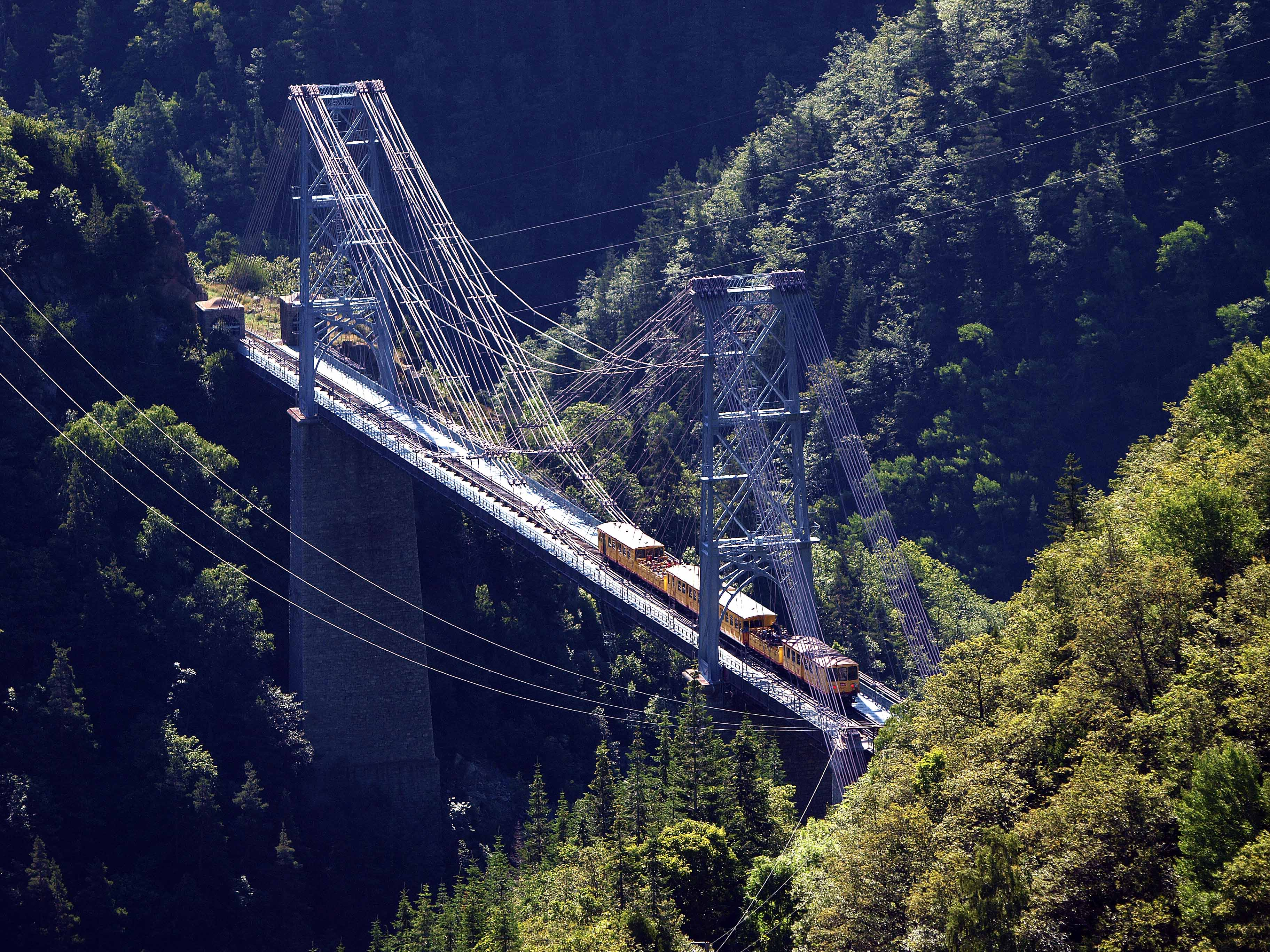 Pont suspendu dit pont Gisclard dans les PO France 2005. Cevenol2